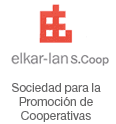 Logo de Elkar-Lan S.Coop., Sociedadad para la Promoción de Cooperativas